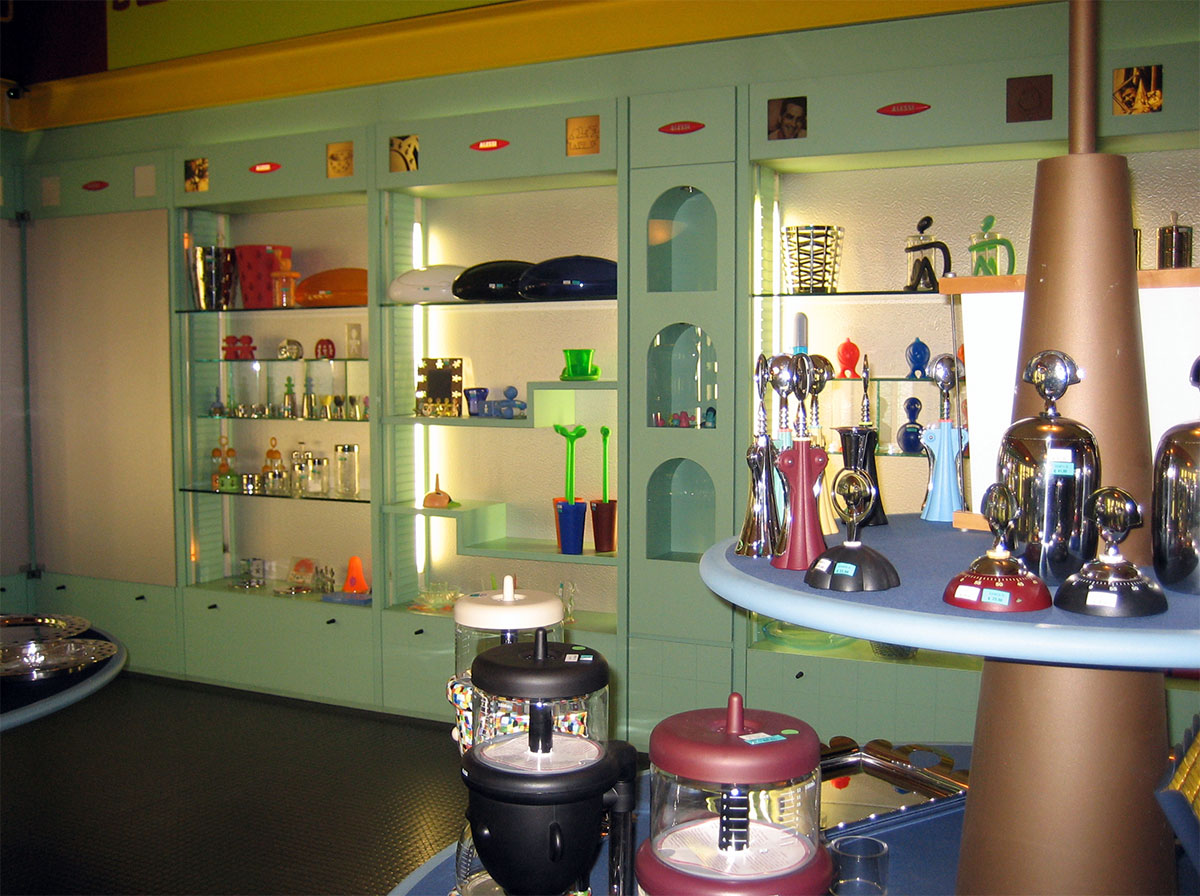 Fabrik-Outlet von Alessi in Omegna, Italy